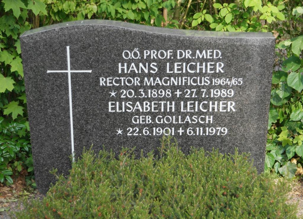 Grab des HNO-Arztes Hans Leicher, 1898-1989, auf dem Hauptfriedhof Mainz